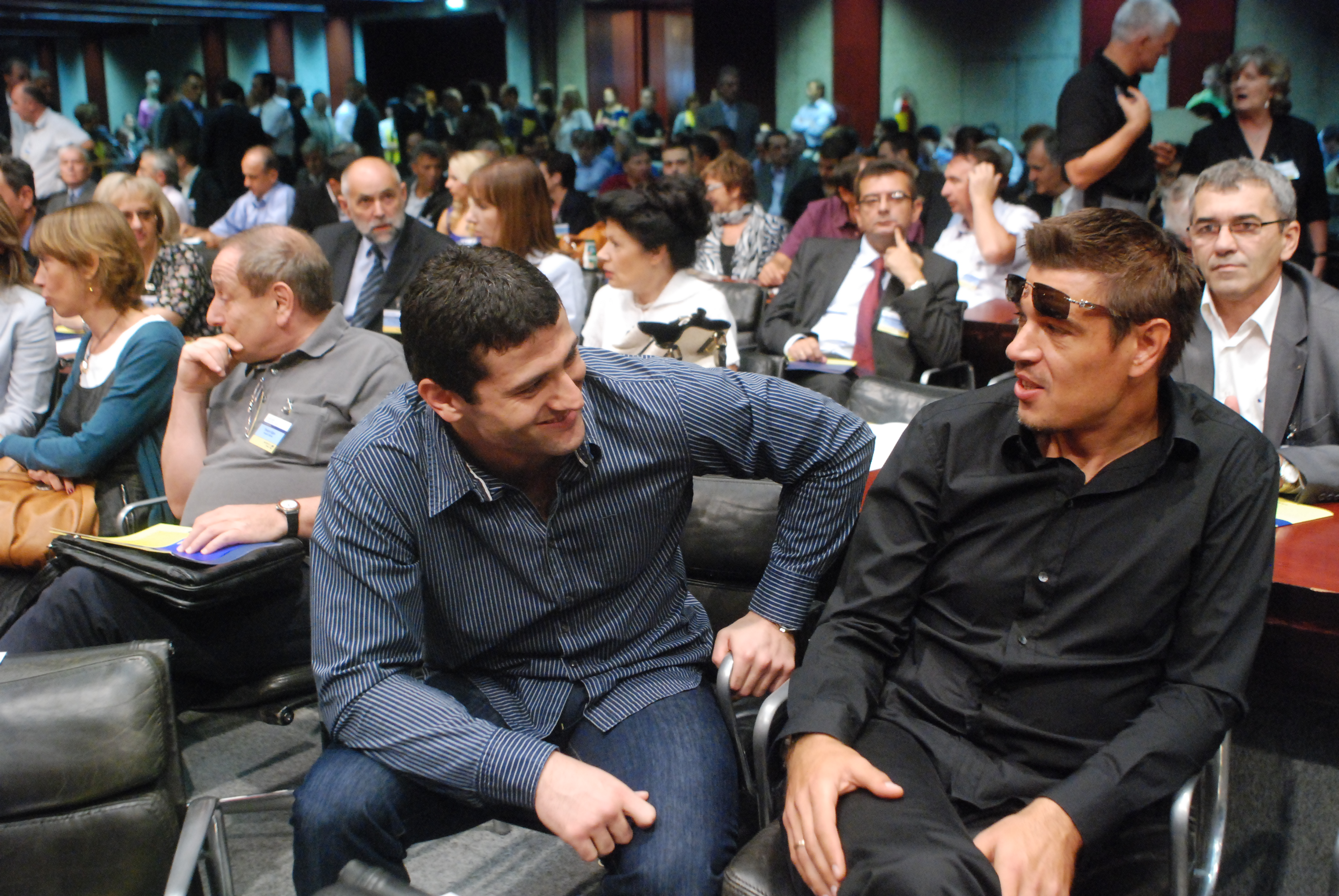 Sportisti Aleksandar Šapić i Savo Milošević na sednici Glavnog odbora DS; autor: Nenad Stojanović, Foto servis DS. Na fotografiji se vidi i glumac Predrag Ejdus.